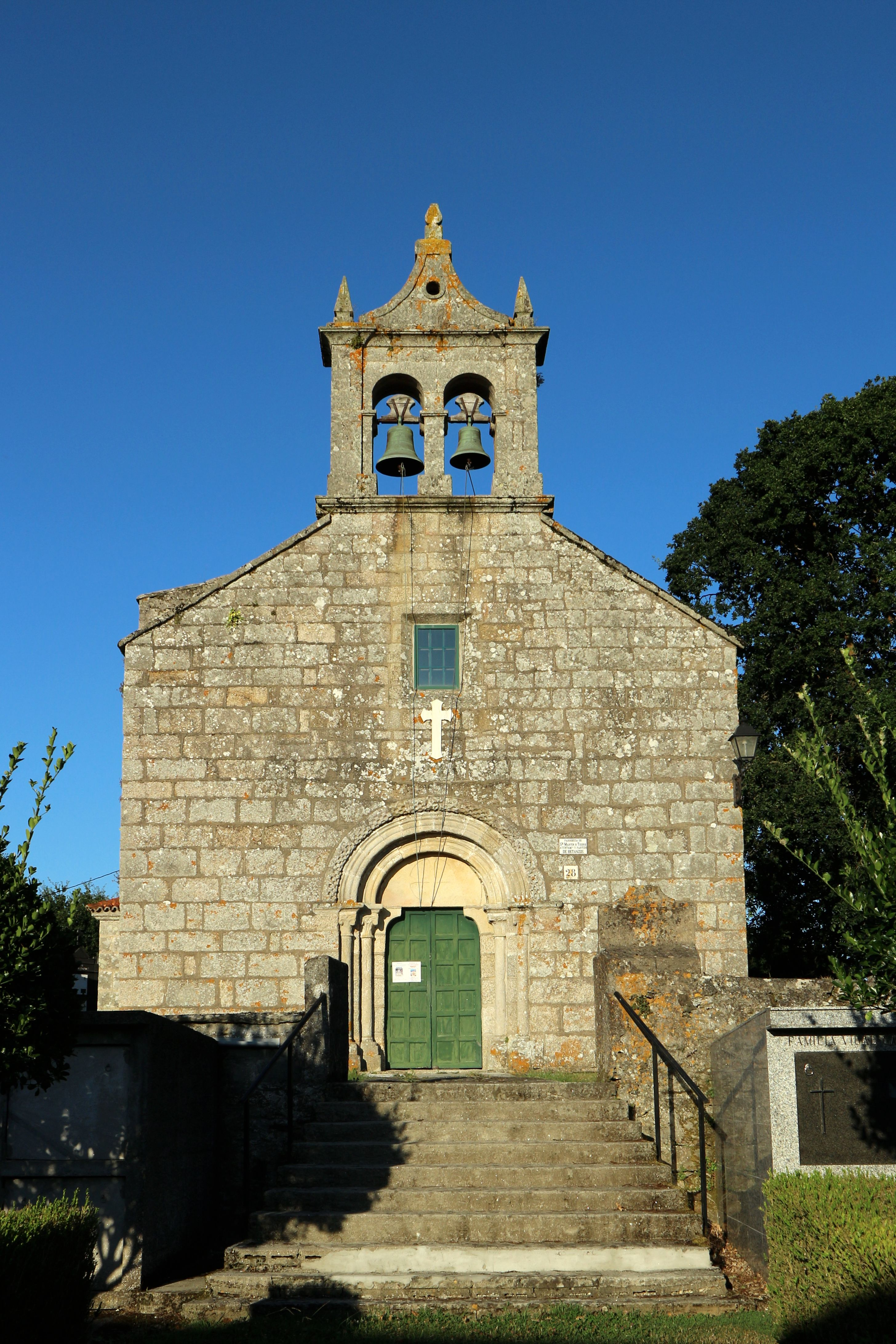 Igrexa de San Martiño de Tiobre. Betanzos O Vello, Tiobre, Betanzos.